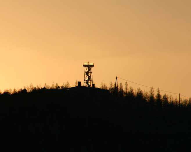 Abendstimmung an der Kohlhaukuppe